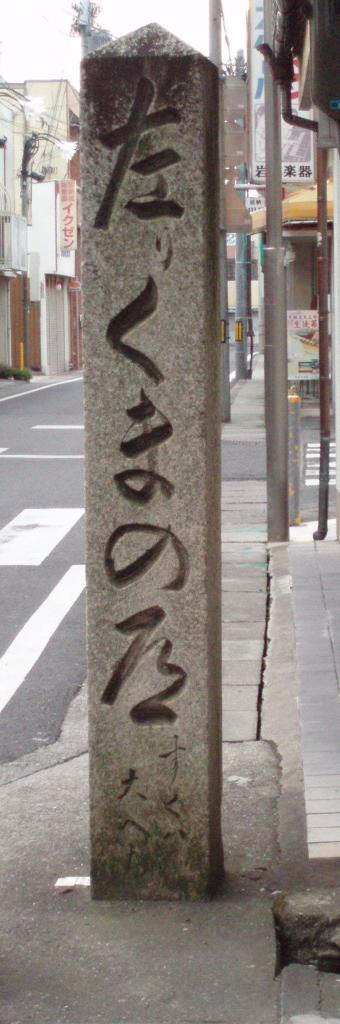 Kita-Shinmachi signepost (北新町道標, Kita-shinmachi dohyo) is a signpost for Kumano pilgrimage routes (熊野古道, Kumano Kodo).